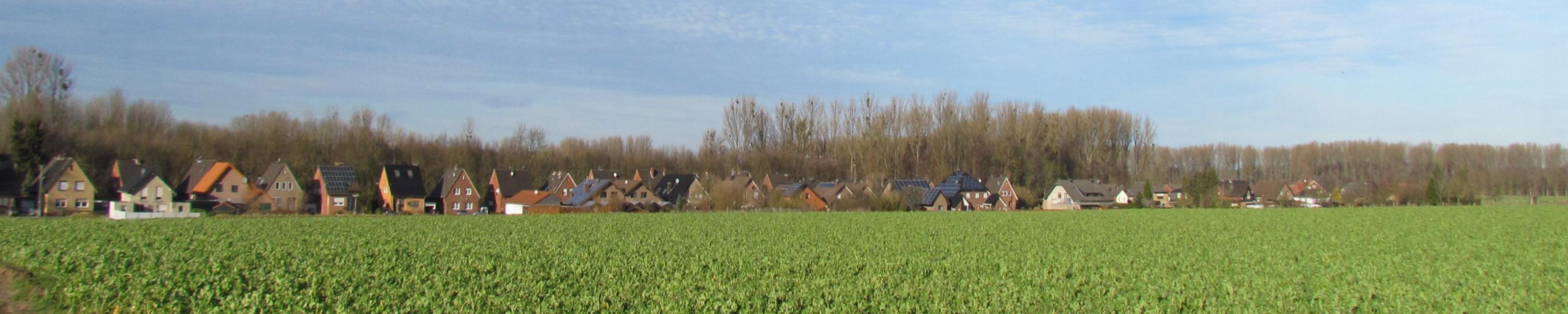 Flahstraß Total